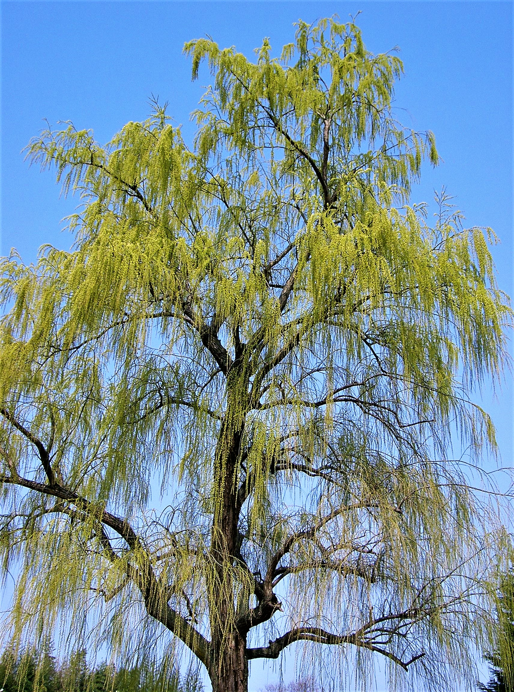 Salix babylonica